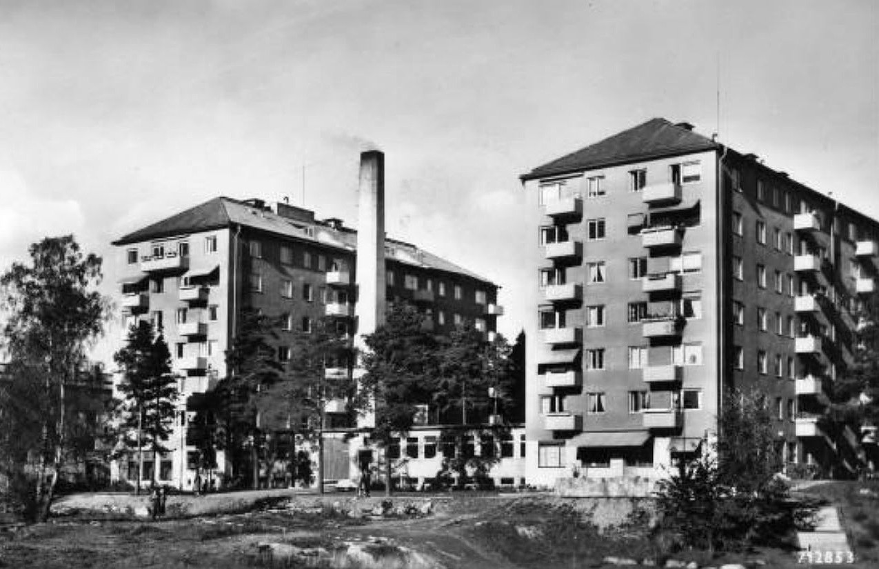 Kvarteret Fyrkantsfilen vid Knektvägen i Gubbängen